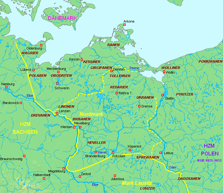 Der Lutizenbund (983-1056/57). Grenzziehung angelehnt an Atlas zur Geschichte I, Haack Gotha 1973, S. 24. Stämme nach J. Herrmann et al., Die Slawen in Deutschland, Berlin 1985, Einbandskarte. Topographische Grundkarte (Küstenlinien, Flüsse, Höhen) von demis (gemeinfrei [1])